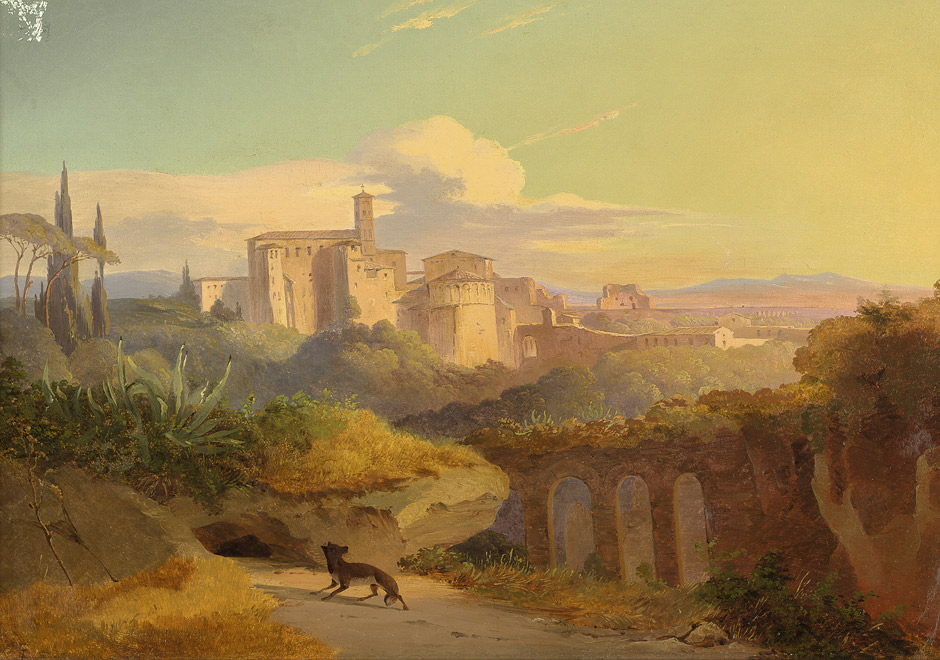 Ansicht einer Klosteranlage nahe Rom mit Blick auf die Campagna.